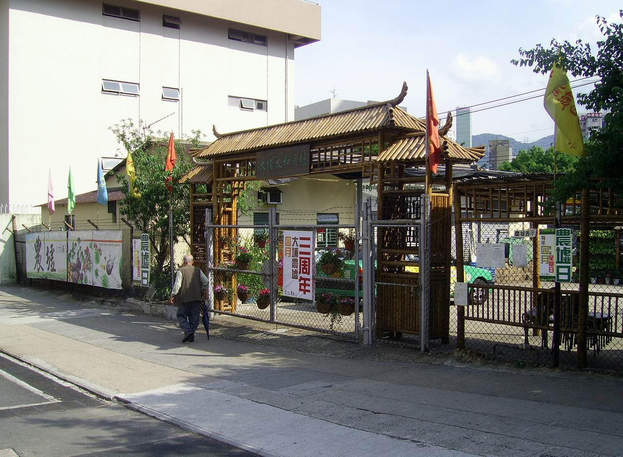 中文（香港）: 太和農墟